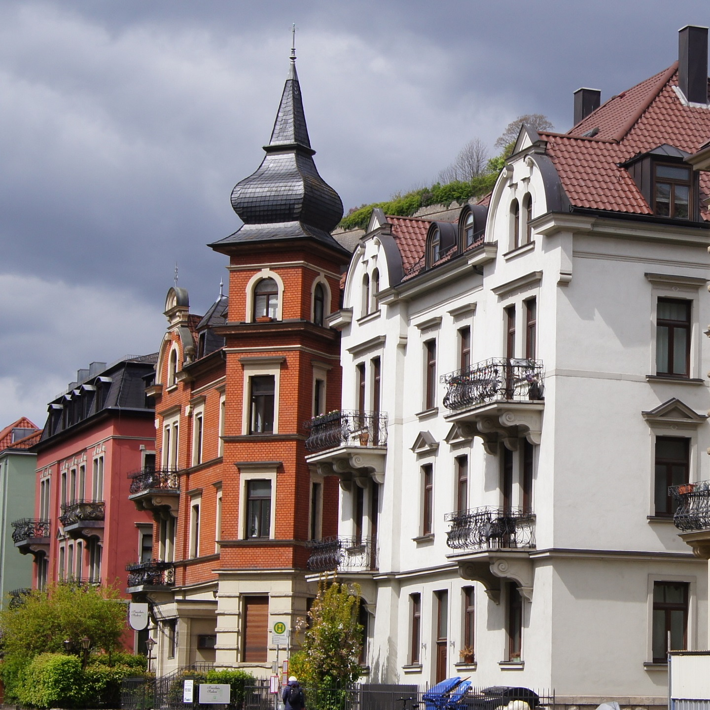 Denkmalgeschützte Mietshäuser, Würzburg - Leistenstraße 4-8